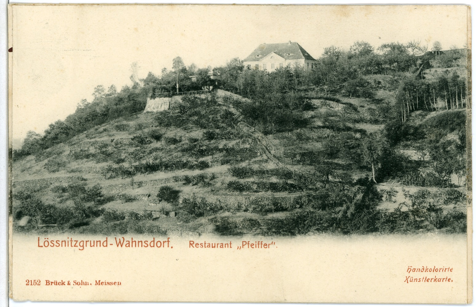 Wahnsdorf; Wahnsdorf-Restaurant "Pfeiffer" This postcard is from publisher Brück & Sohn in Meißen ( postcard has a unique number 02152 and is available in a higher resolution at the publisher. This images was uploaded in a cooperation project between Wikipedians and the publisher.